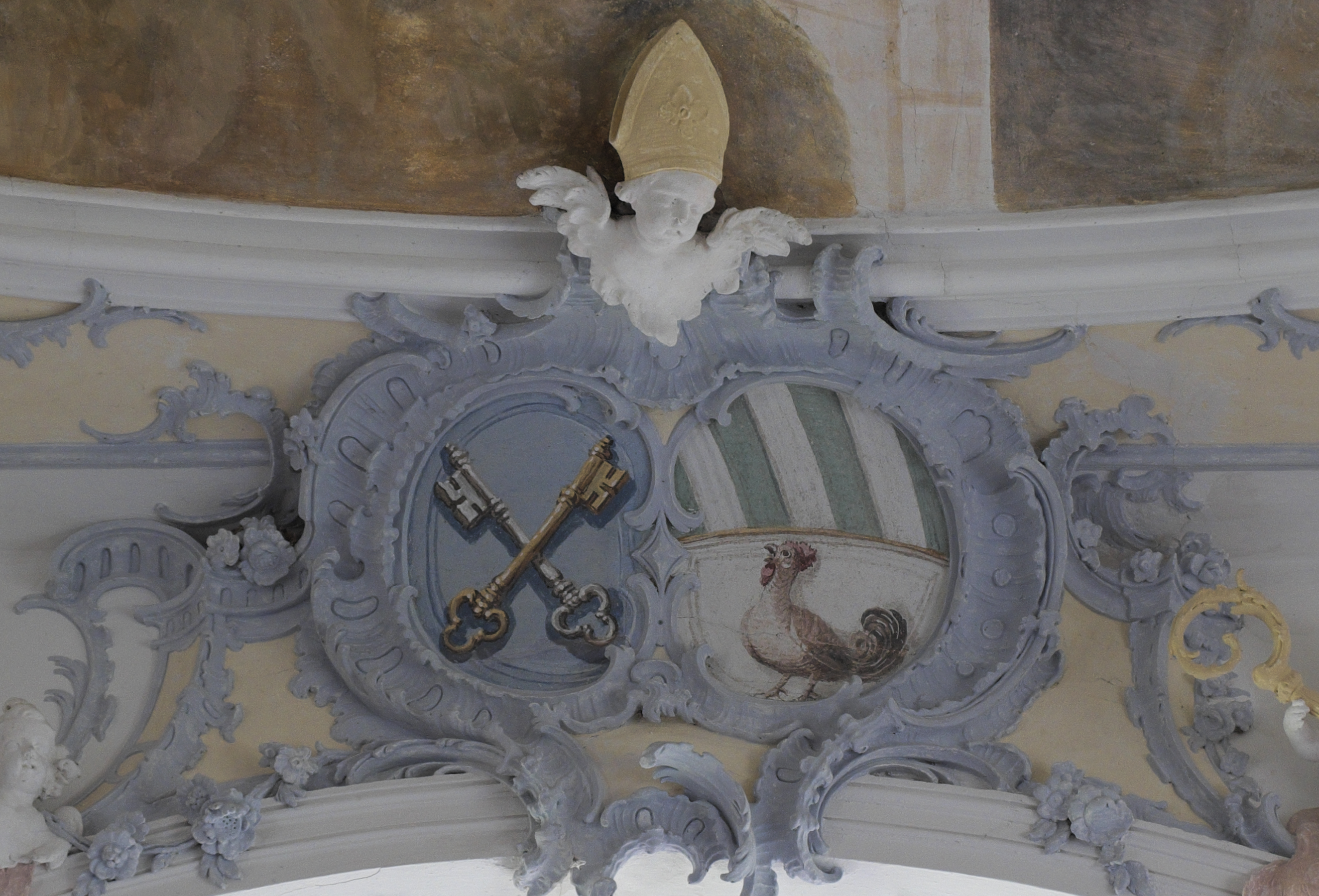 Katholische Kapelle Sankt Ottilia in Rott im Landkreis Landsberg am Lech (Bayern/Deutschland), Stuck um 1775, von Johann Michael Merk, Wappen des Abtes Engelbert Goggl am Chorbogen